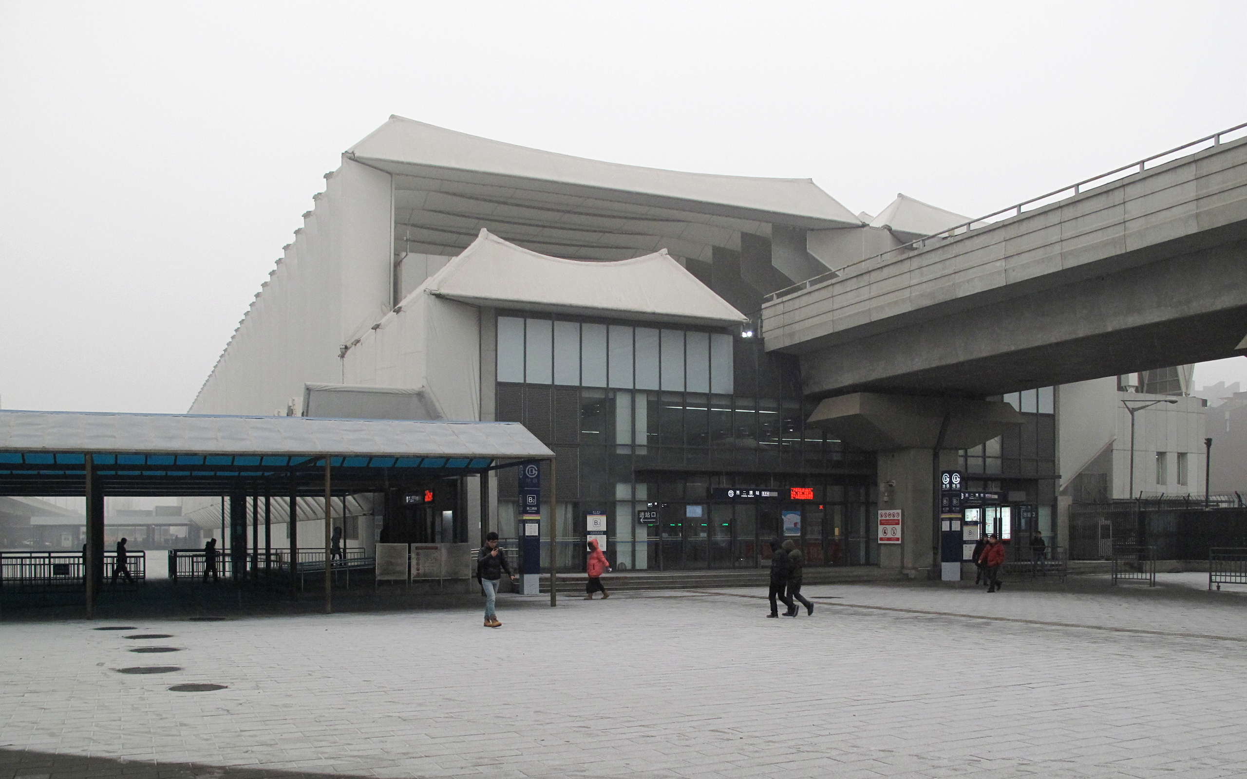 北京地铁西二旗站，是13号线和昌平线的换乘车站。